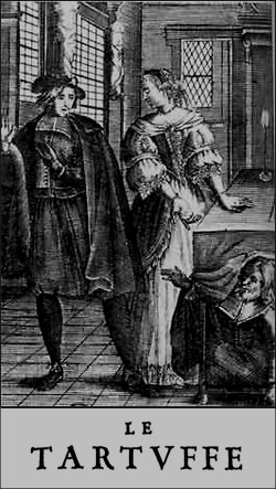 Le Tartuffe, Frontispice de l'édition de 1669 par Molière